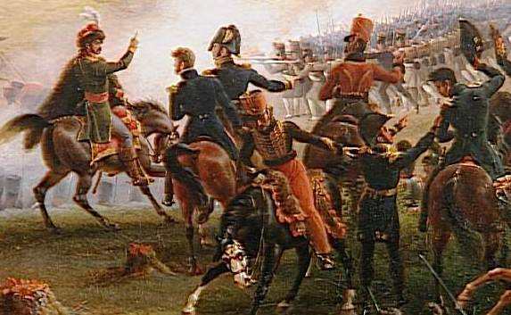 Bataille de la Moskowa, le 7 septembre 1812, seconde attaque de la grande Redoute. (detail)